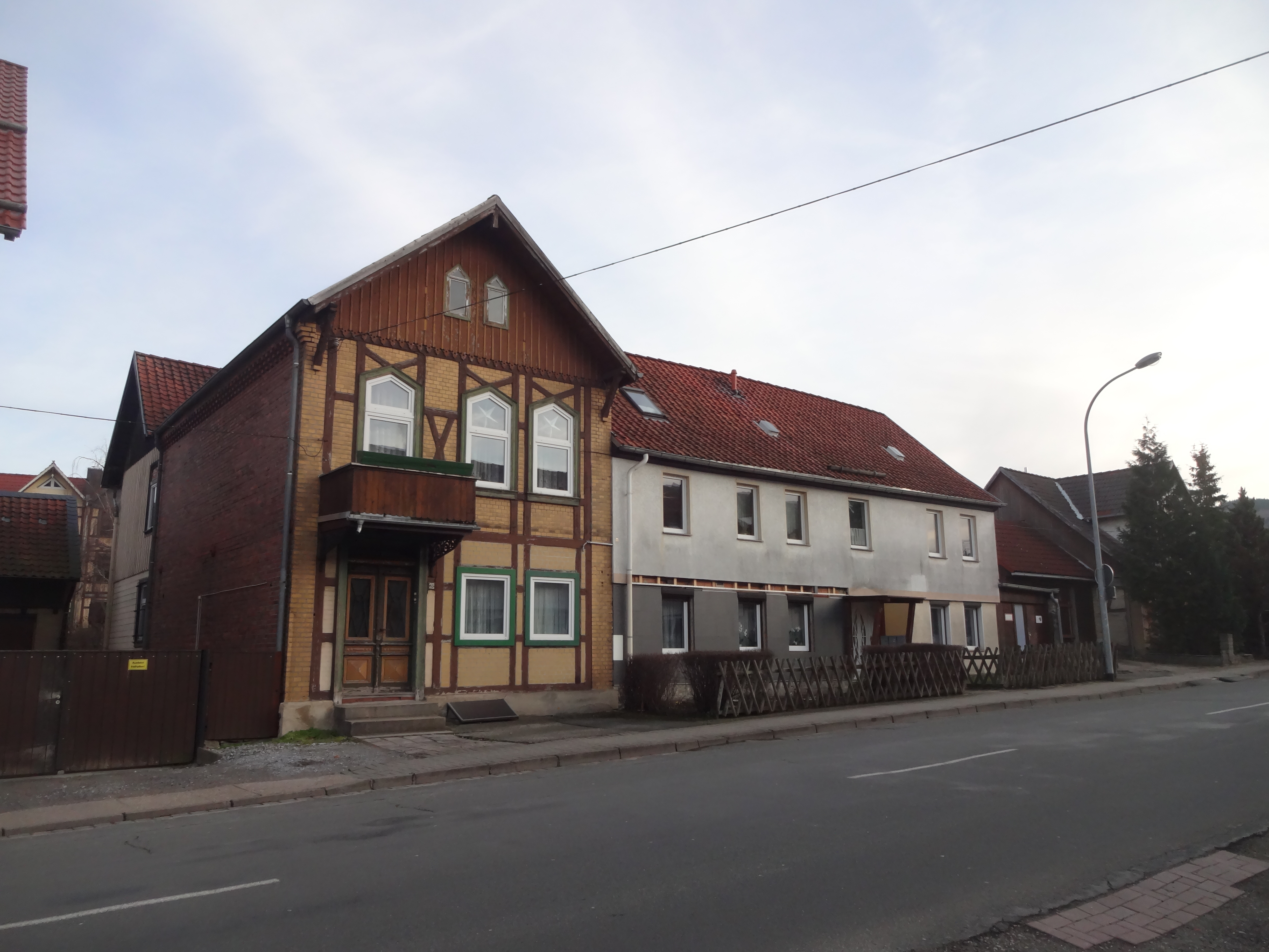 ehemals denkmalgeschütztes Wohnhaus in der Friedrichstraße 85 in Wernigerode